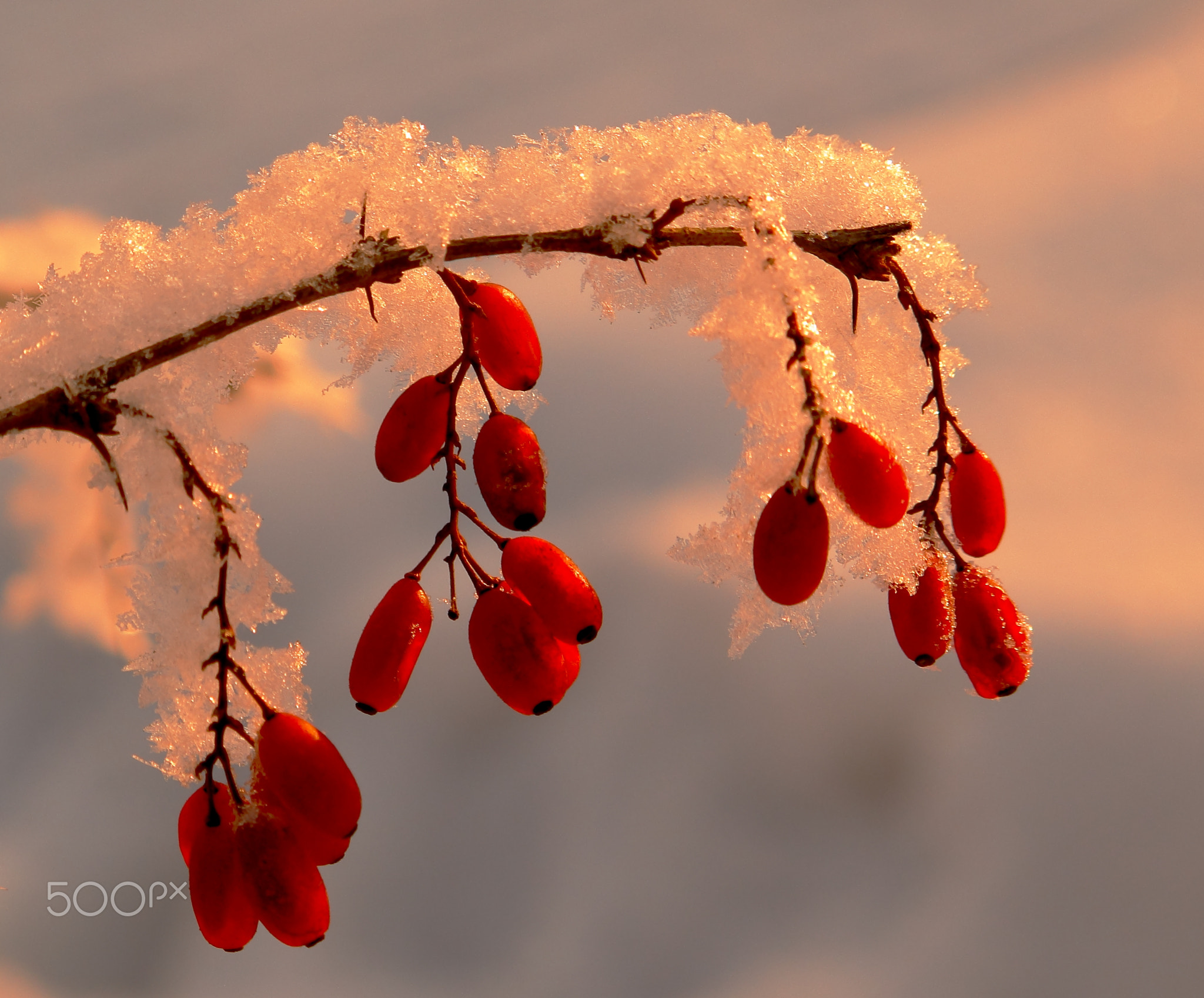 500px provided description: 3 ??? ? ?????? ? ????? ?????? ?????? ?????? ??? ?????? -35. [#???? ???????? ???? ??? ????? ???????? ????? ??????? ????? ???? ?????????? ??????? ?????????]